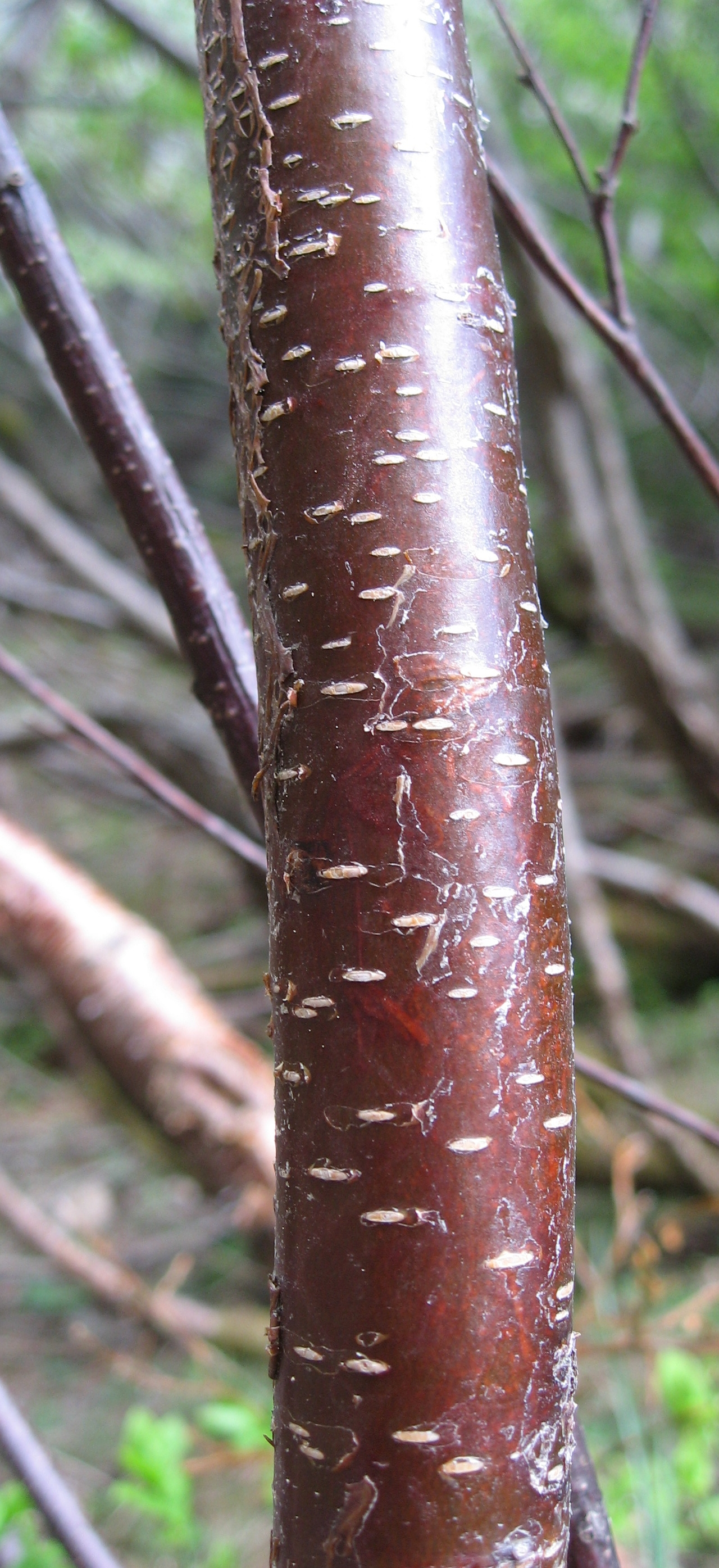 Lenticelle de cerisier à Chamonix